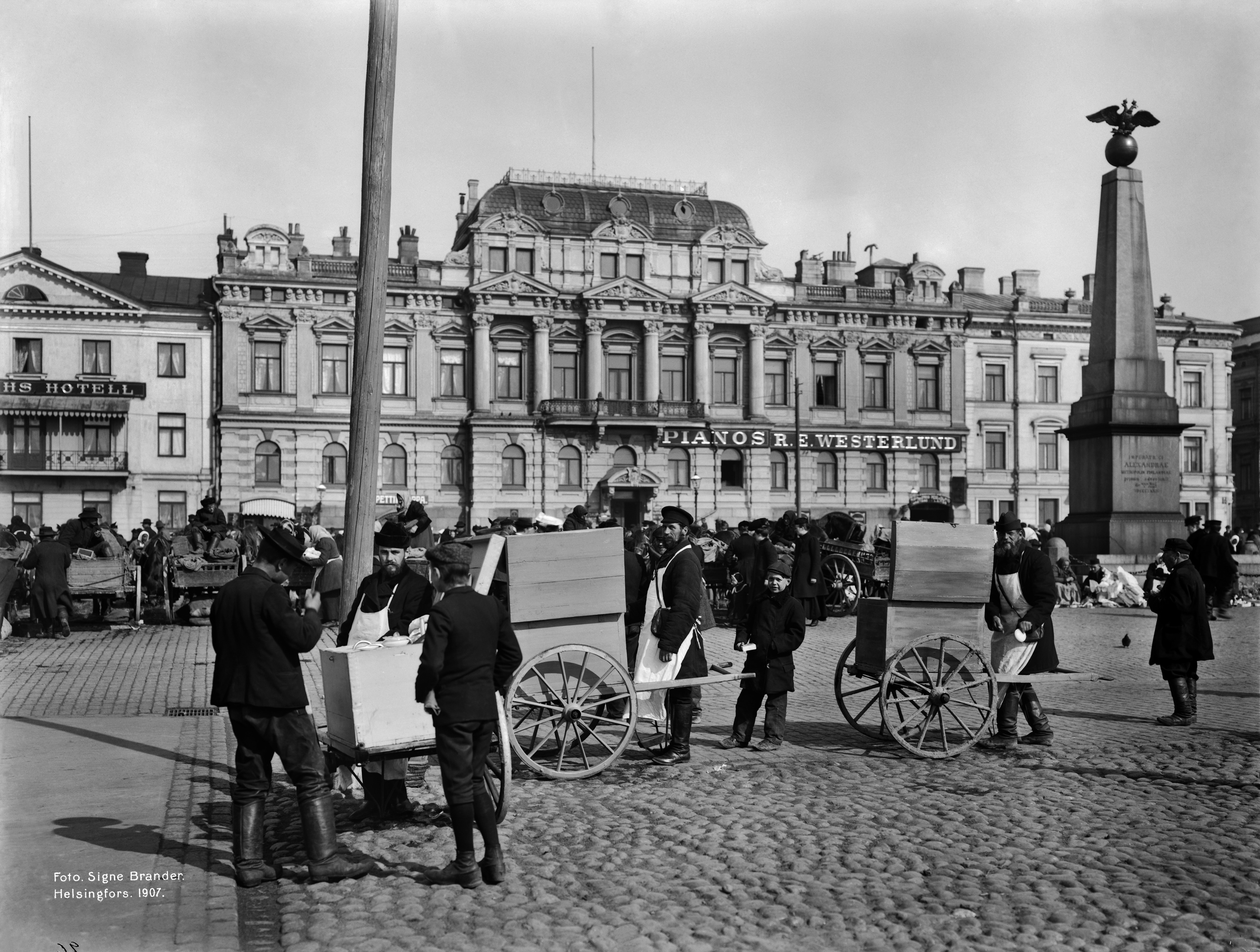 Venäläisiä jäätelökauppiaita Kauppatorilla. Taustalla Keisarinnan kivi ja Pohjoisesplanadi 7. -- negatiivi ja vedos, lasi paperi pahvi, mv